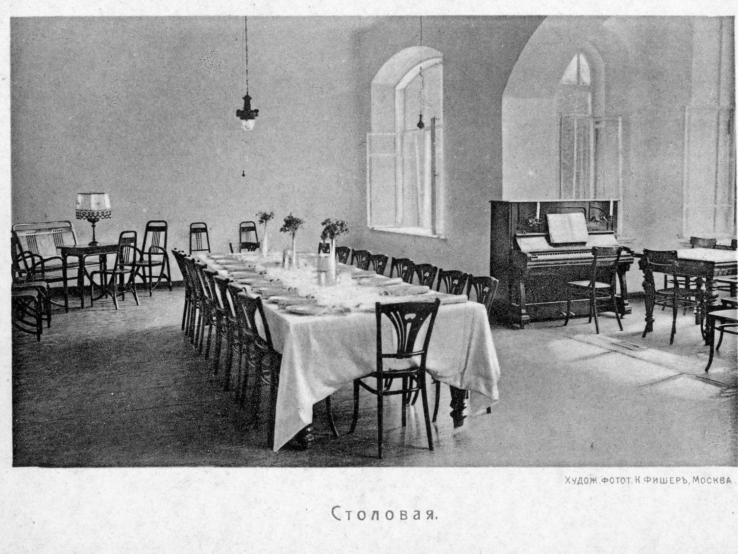 Столовая санатория "Лесное", Ставрополь (ныне Тольятти)